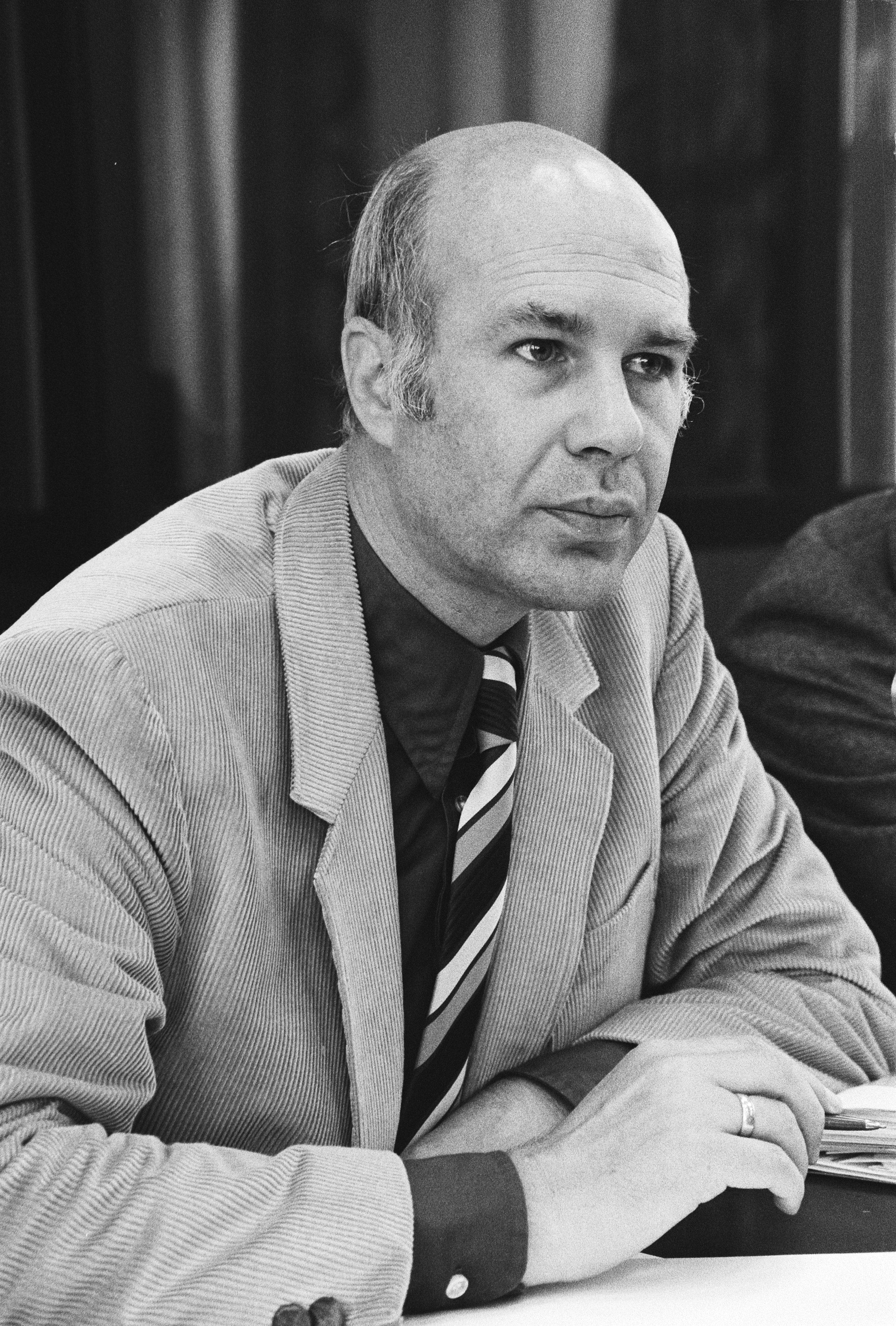 Collectie / Archief : Fotocollectie Anefo Reportage / Serie : Hoorzitting over "leegstandswet" Beschrijving : E. Nijpels (D66) Datum : 3 september 1980 Locatie : Den Haag, Zuid-Holland Trefwoorden : hoorzittingen, huisvestingsbeleid, portretten Persoonsnaam : Nijpels, Erwin Instellingsnaam : D66 Fotograaf : Dijk, Hans van / Anefo Auteursrechthebbende : Nationaal Archief Materiaalsoort : Negatief (zwart/wit) Nummer archiefinventaris : bekijk toegang 2.24.01.05 Bestanddeelnummer : 930-9975